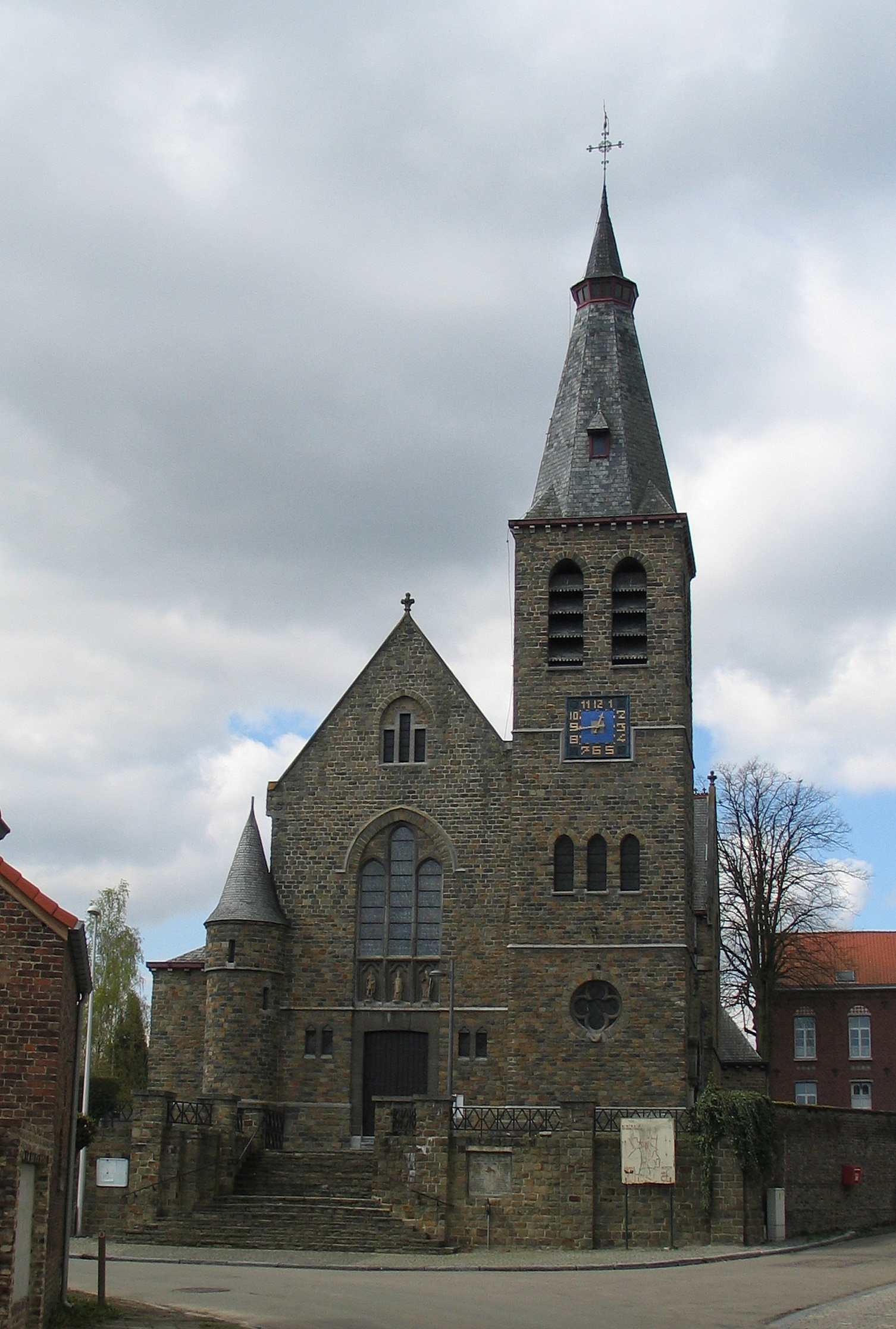 de kerk van Bevingen, België